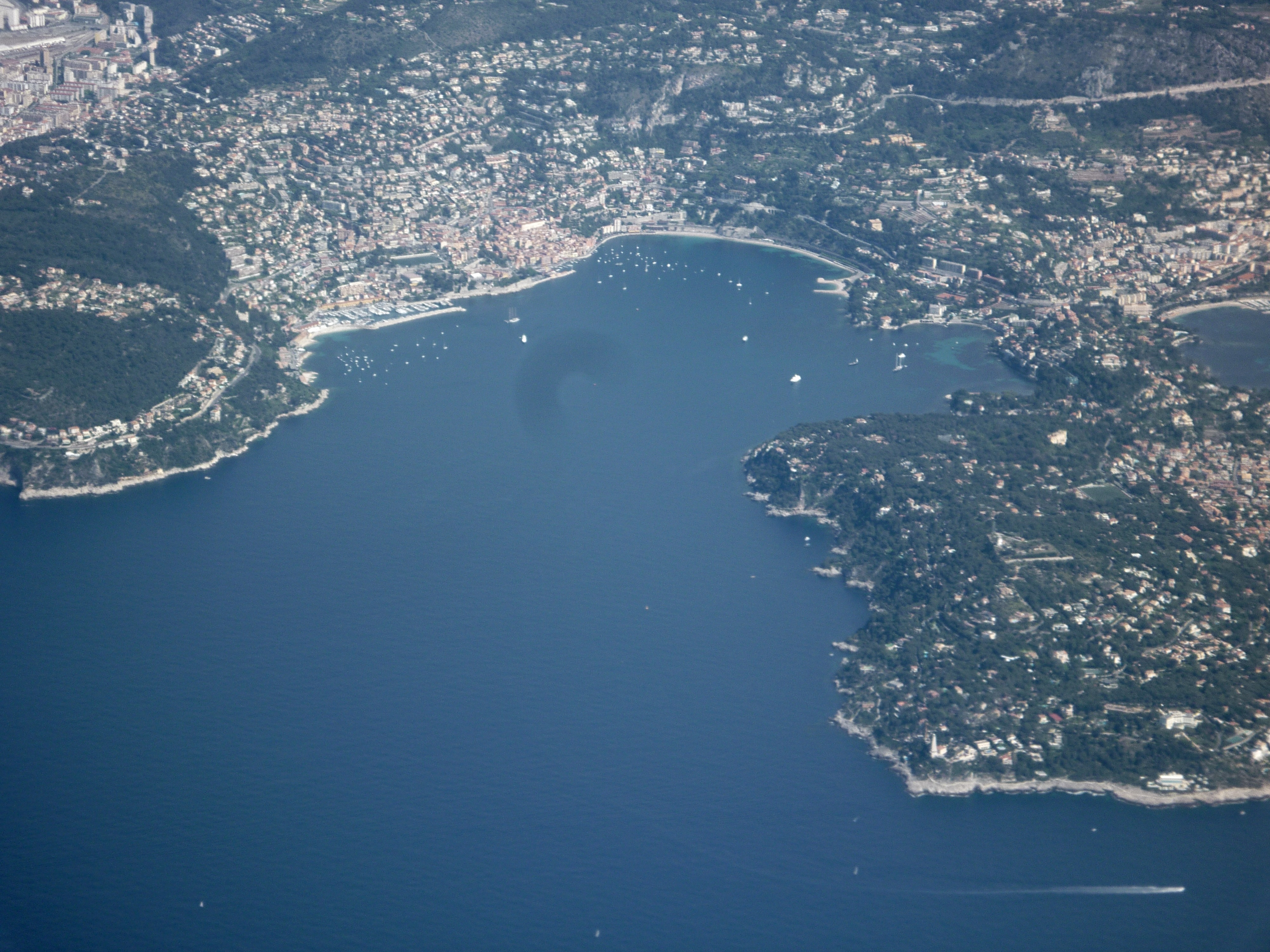 Rade de Villefranche-sur-Mer, près de Nice, Alpes-Maritimes, France